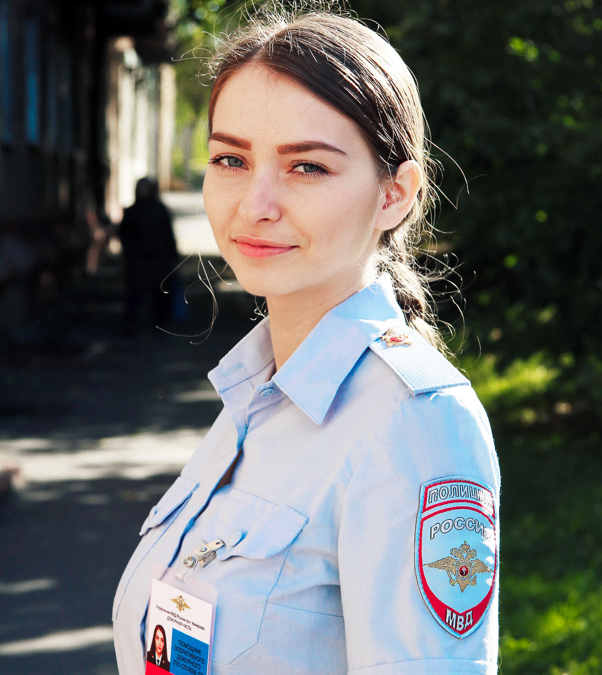 рядовой полиции